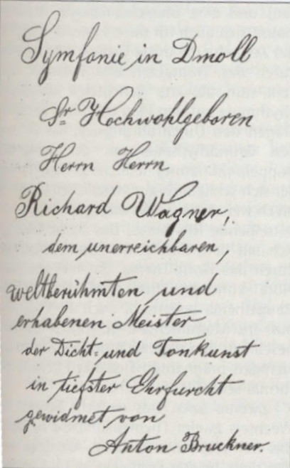 opdracht 3e symfonie van Bruckner aan Wagner